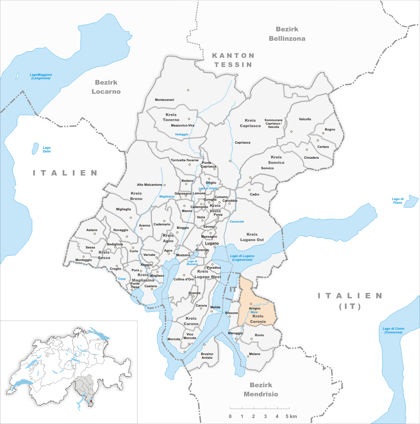 Municipality Arogno